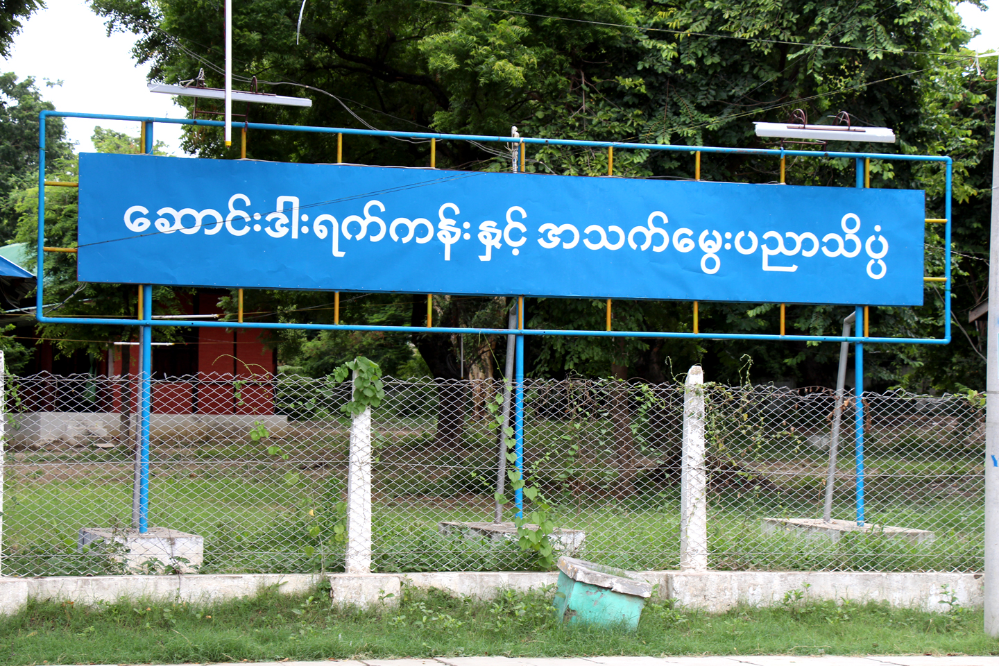 မြန်မာဘာသာ: ဆောင်းဒါးရက်ကန်းကျောင်း ( အမရပူရမြို့(တောင်မြို့)ရှိ စစ်ကိုင်း-မန္တလေးလမ်းမ)